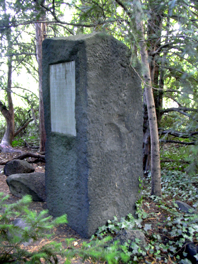 Gedenkstein der Ludwigs-Universität Gießen für die gefallenen Studenten des deutsch-französischen Krieges 1870/71, aufgestellt im Botanischen Garten der Universität.